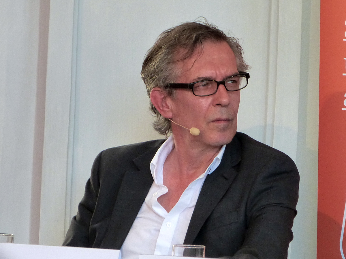 German writer Ulrich Peltzer at the Erlanger Poetenfest 2015